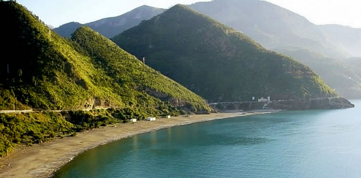 Aux portes de la Kabylie, Ziama Mansouria (wilaya de Jijel, Algérie)